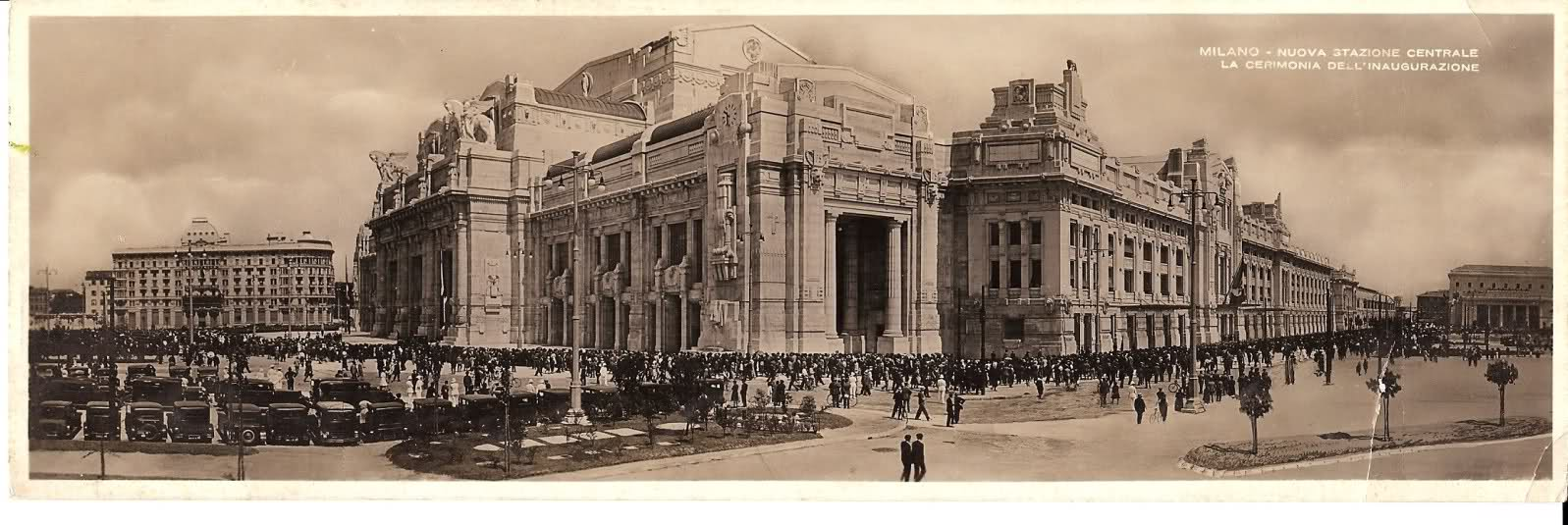 La Stazione Centrale nel giorno della sua inaugurazione.